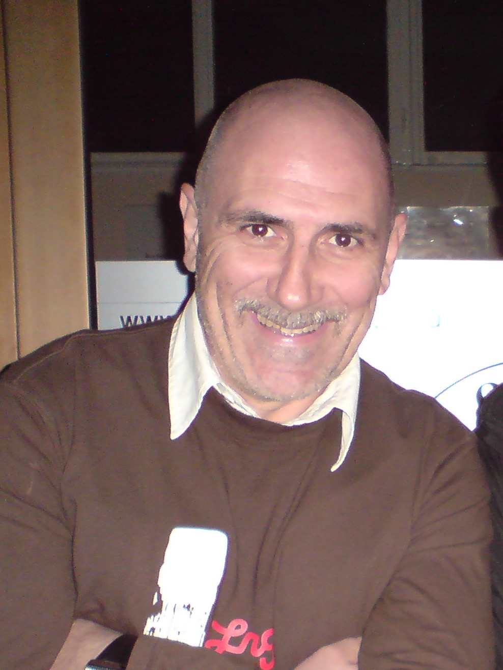 Драган Божа Марјановић - српски глумац